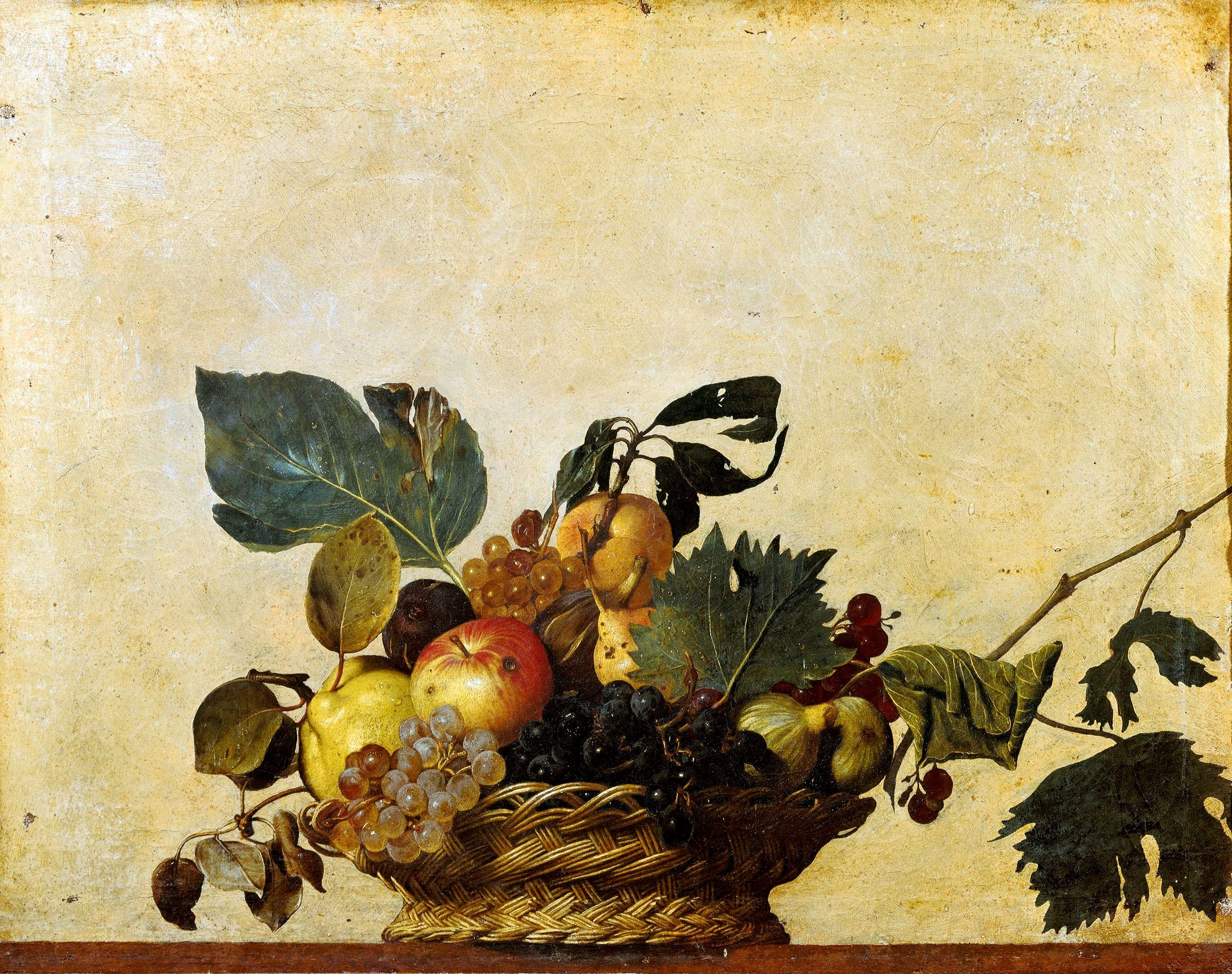 Still Life(Hintergrund von unbekannter Hand übermalt)